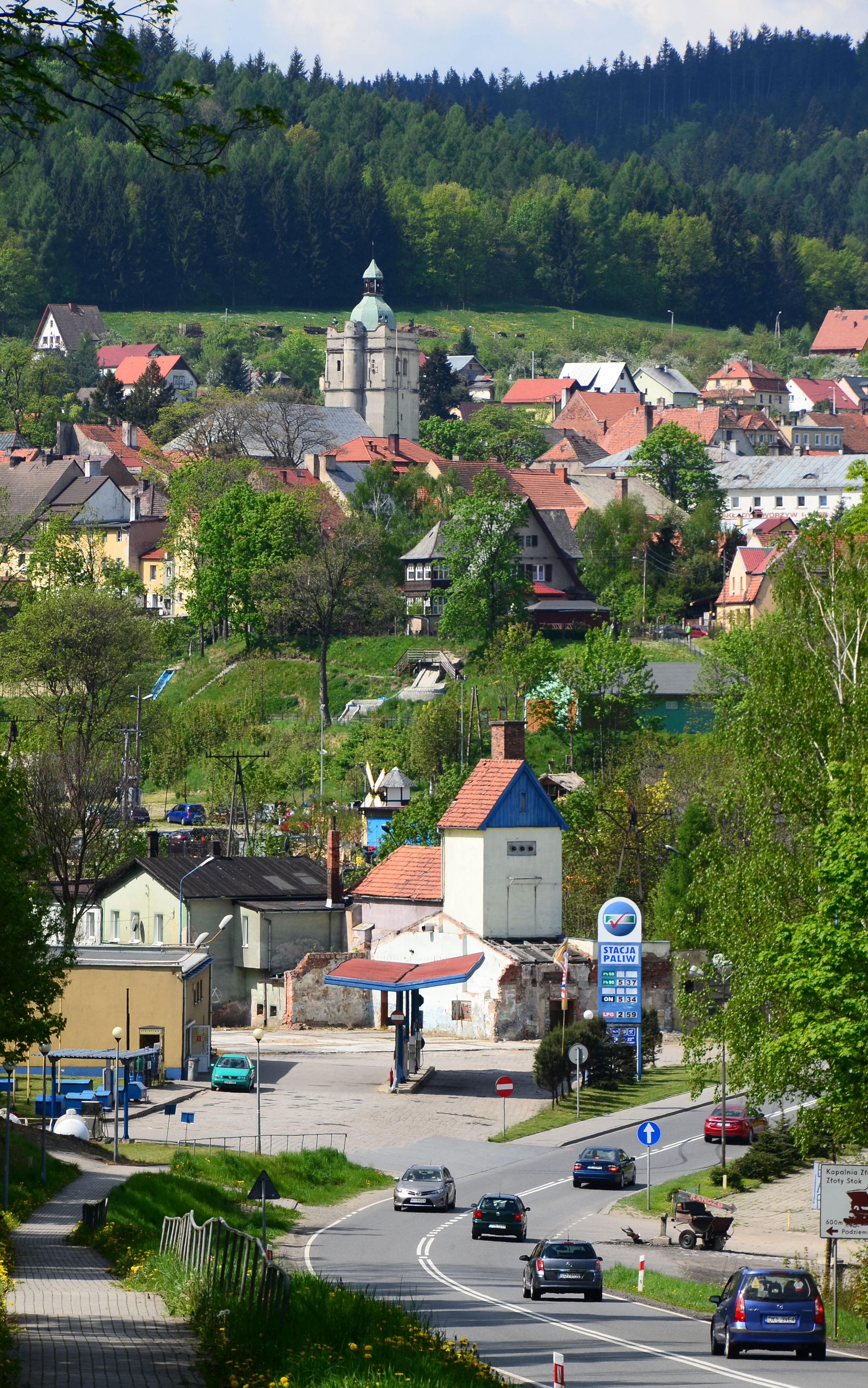 Panorama Złotego Stoku